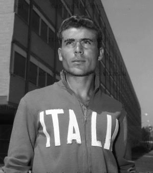 Francesco La Macchia